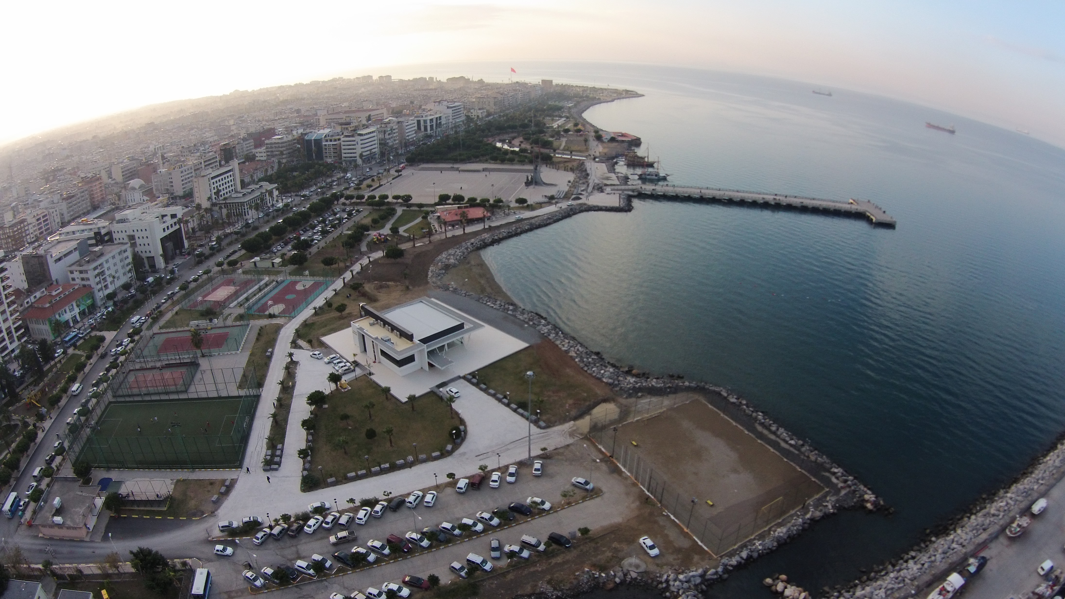 Hatay'ın İskenderun ilçesinden havadan sahil görünümü